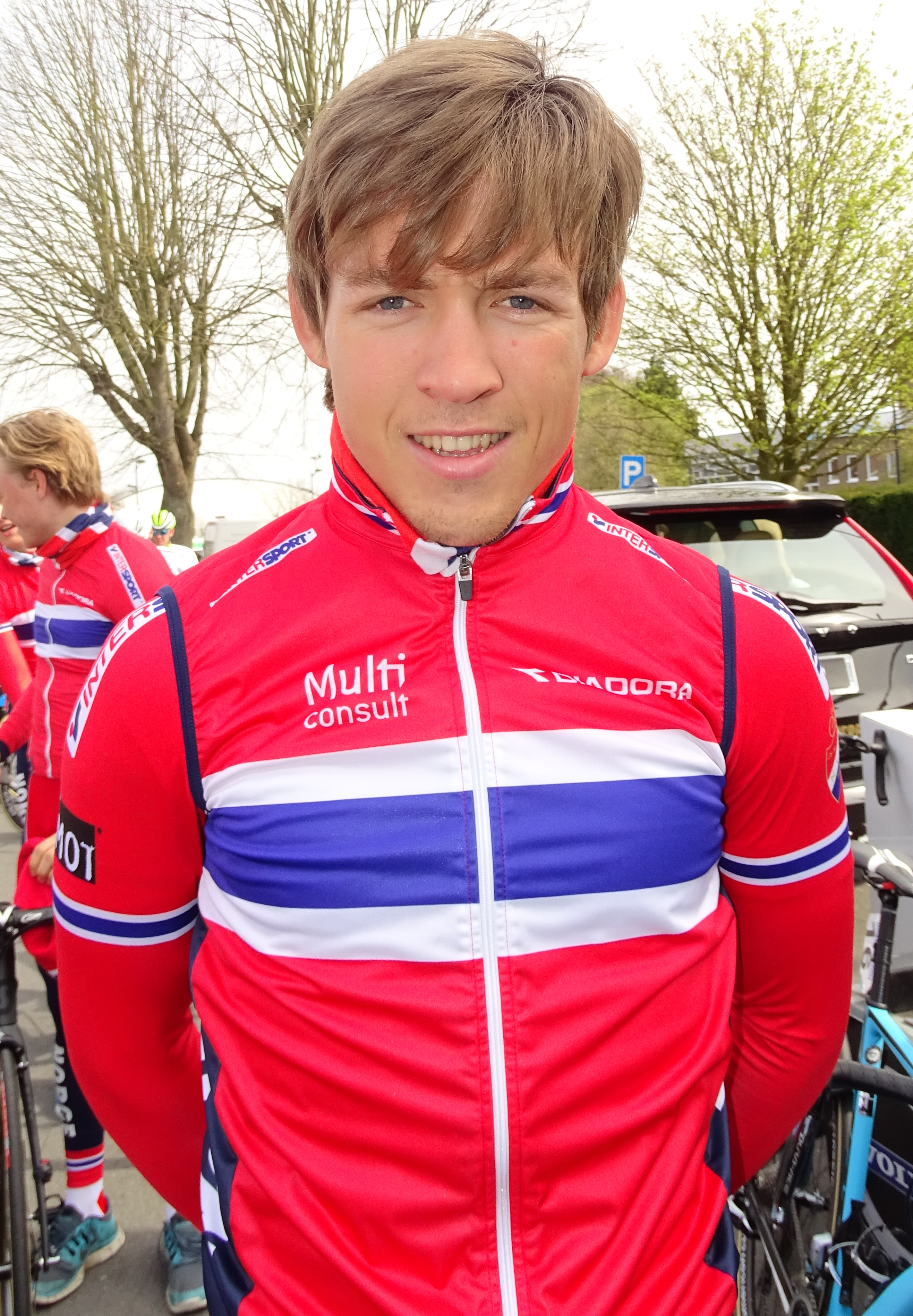 Reportage réalisé le samedi 9 avril à l'occasion du départ et de l'arrivée du Tour des Flandres espoirs 2016 à Audenarde, Belgique.